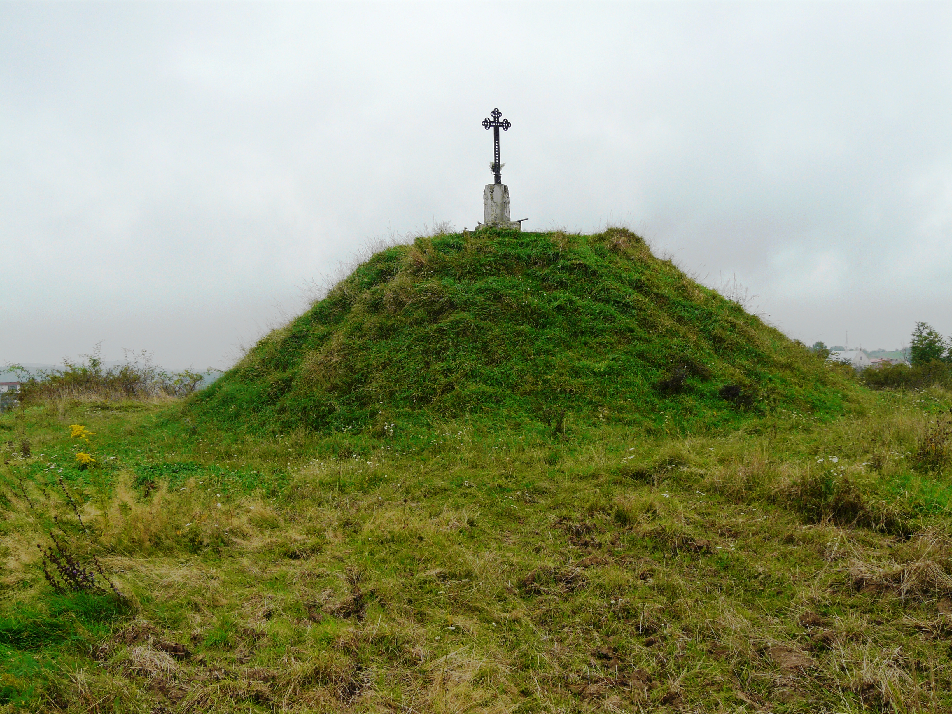 Kopiec